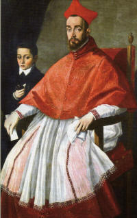 Antonio Carafa (cardinale)